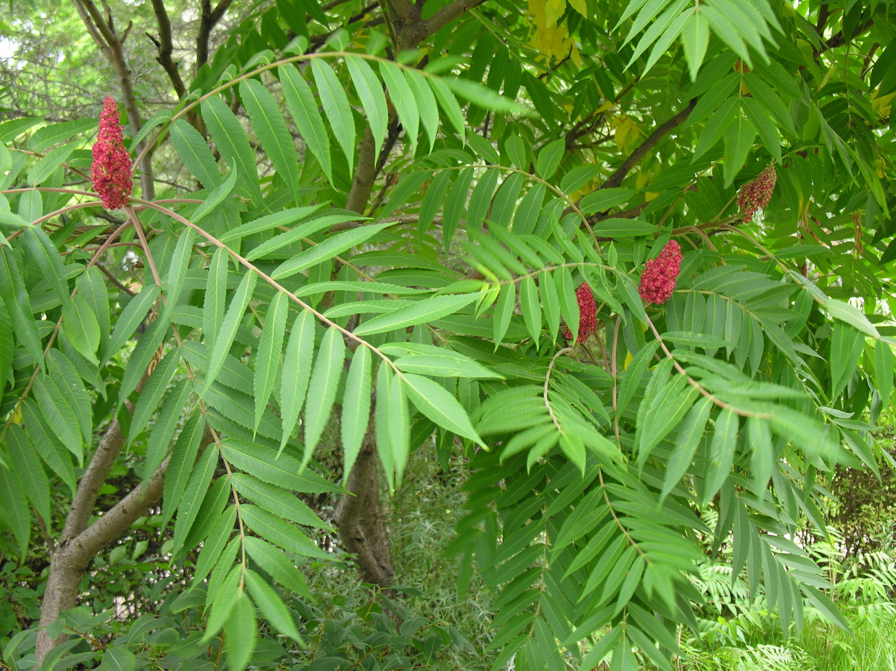 Rūgštusis žagrenis (Rhus typhina). Fam. Anacardiaceae Foto: Algirdas, 2005 m. rugpjūčio 3 d.